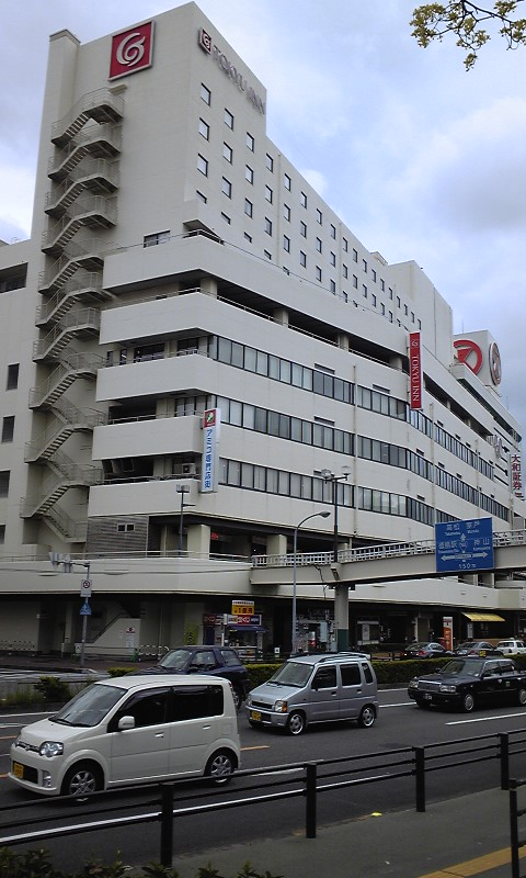 徳島東急インの写真。